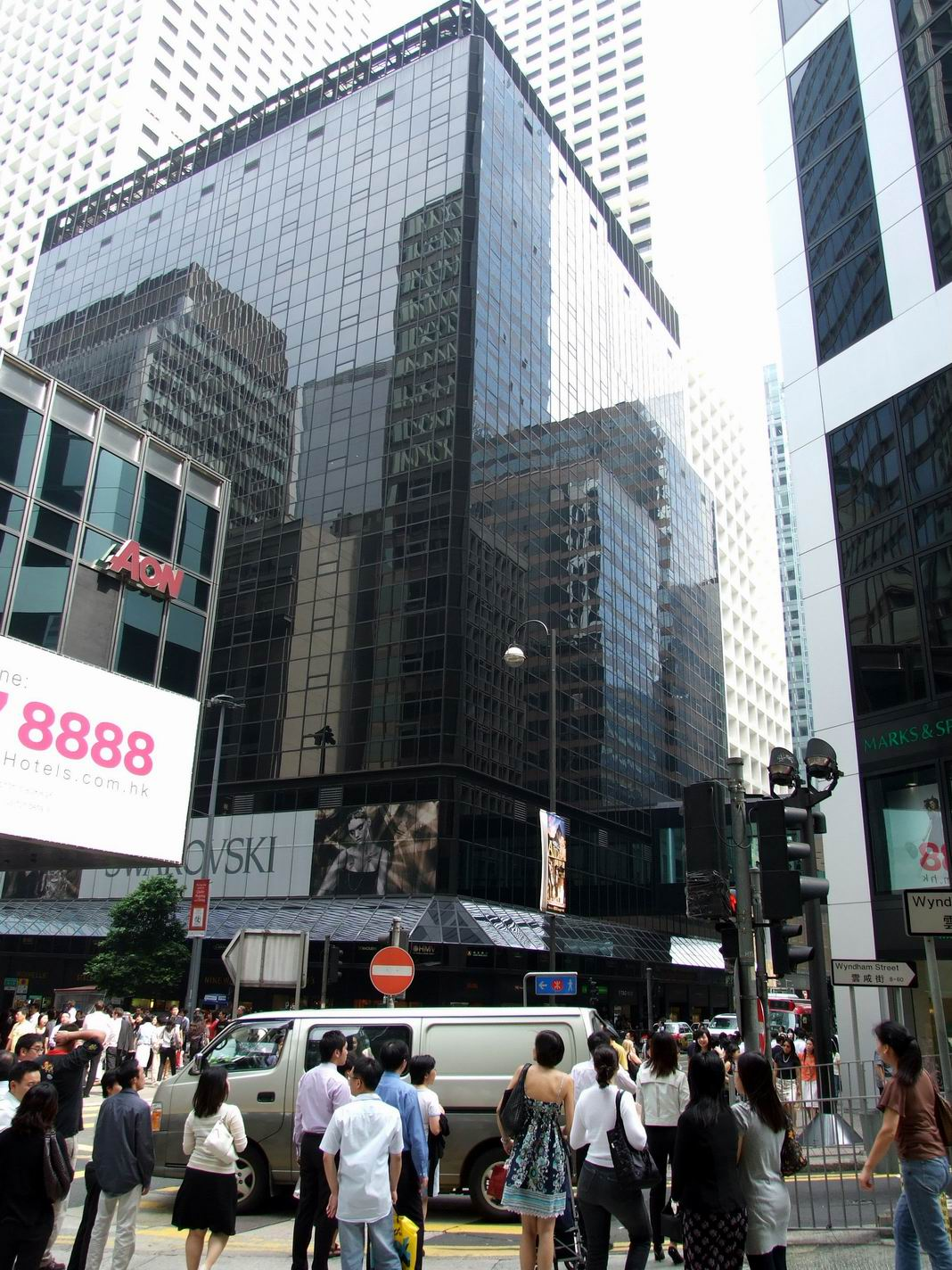 中建大廈